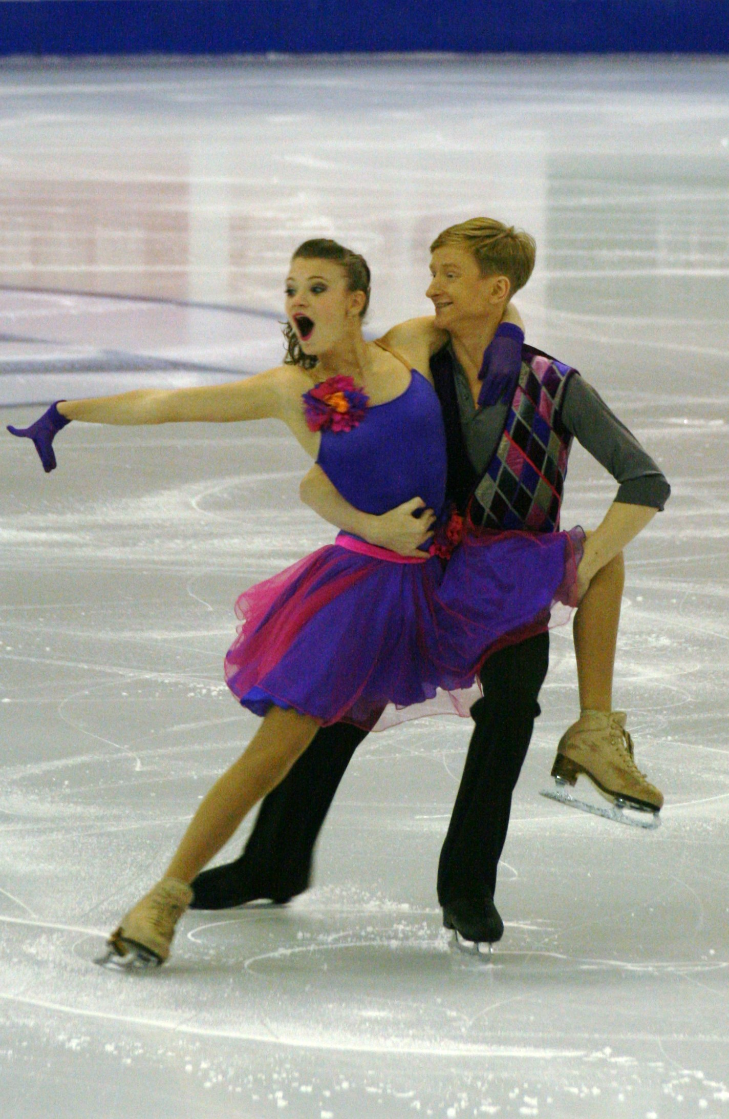 Анаставия Скопцова и Кирилл Алешин (Россия) на финале Гран-при по фигурному катанию среди юниоров 2015-2016.